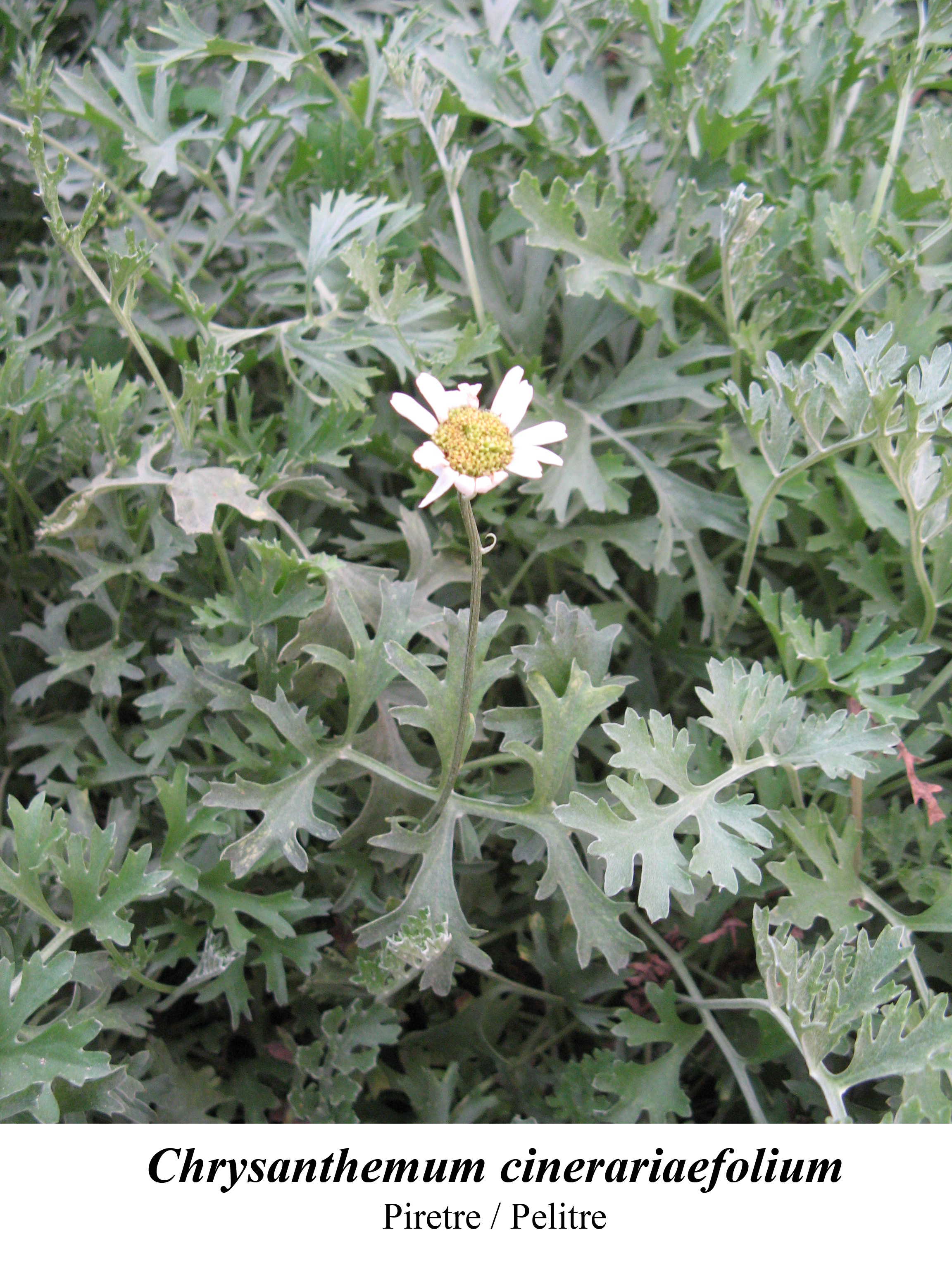 planta medicinal